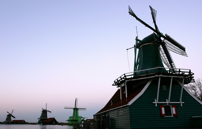 (c) Barbara B. Amsterdam // Website